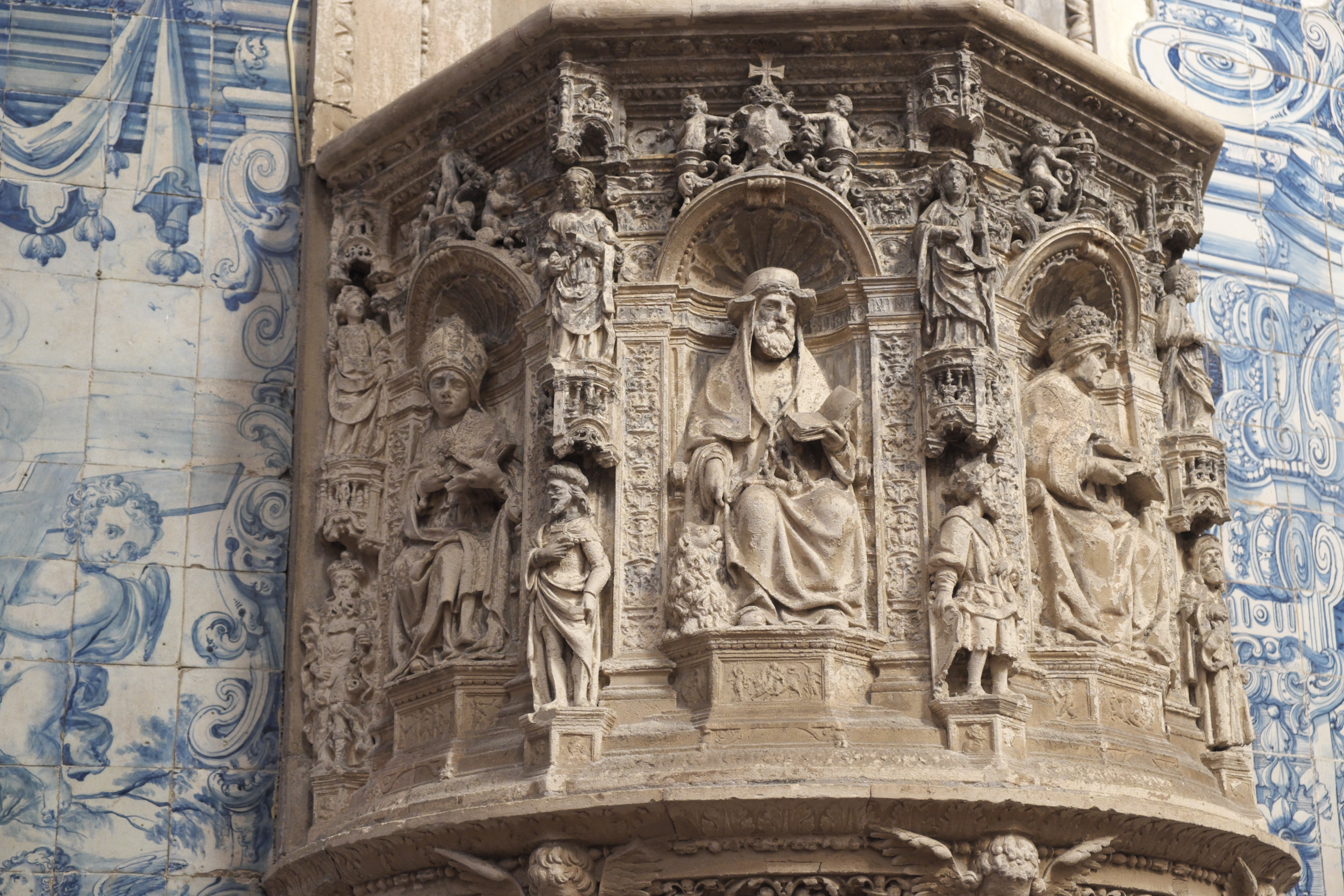 Ehemalige Augustinerchorherrenstiftskirche Santa Cruz in Coimbra (Portugal), Renaissance-Kanzel von Nicolau Chanterene, von 1521